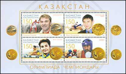 Почтовая марка Казахстана - Чемпионы Олимпийских игр от Казахстана